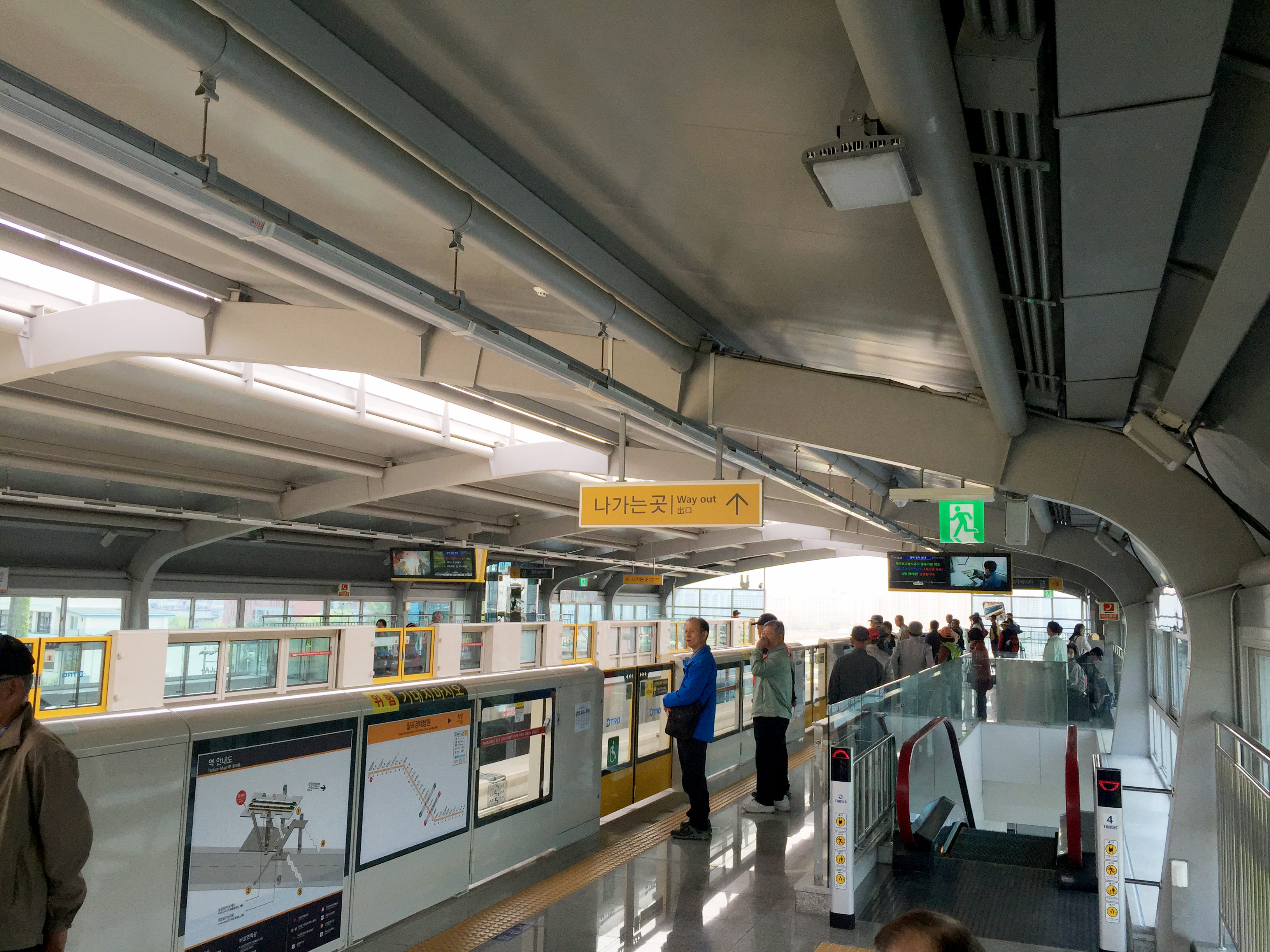 칠곡경대병원역 승강장